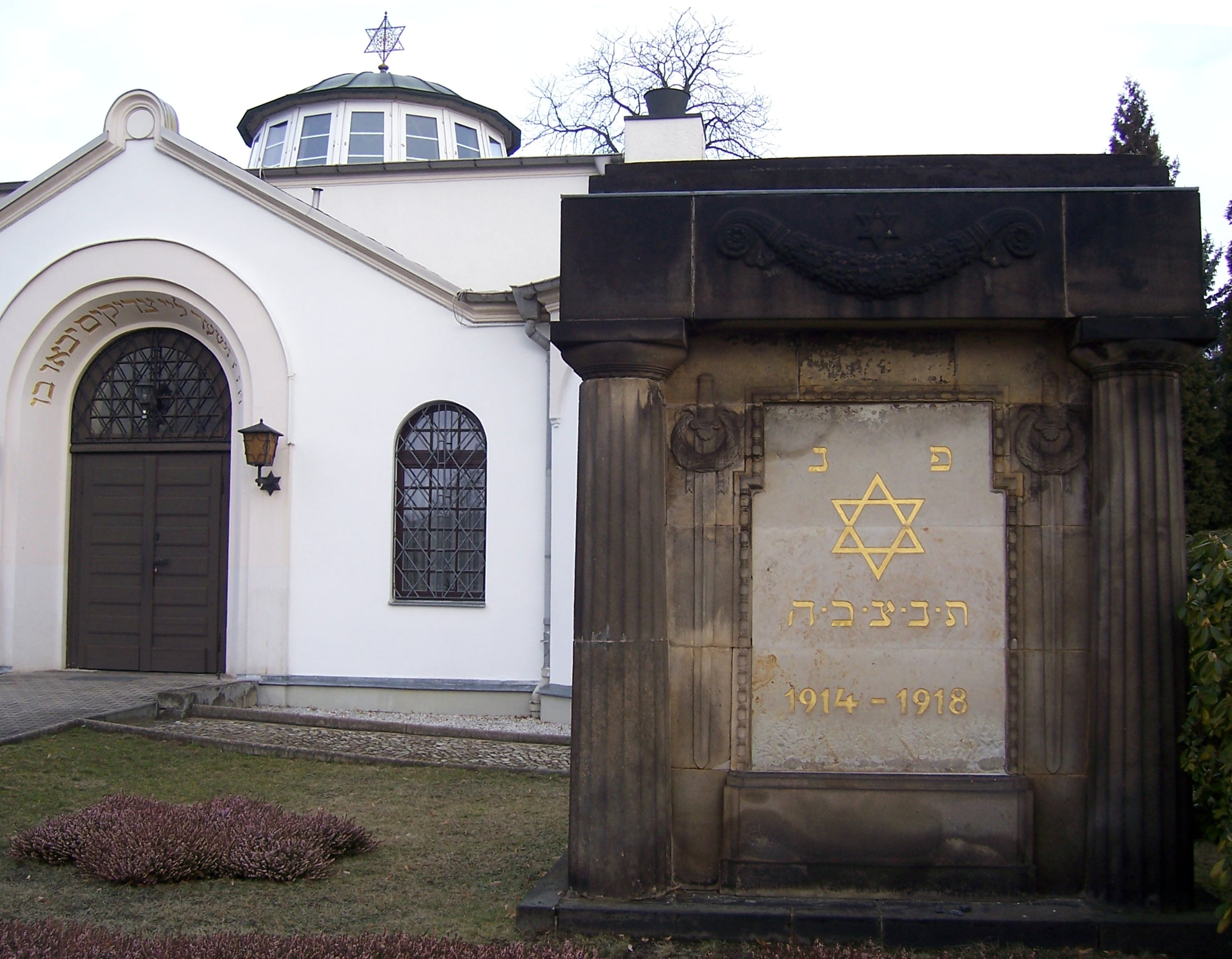 Ehrenmal für gefallene jüdische Soldaten des Ersten Weltkriegs auf dem Neuen Jüdischen Friedhof Dresden.